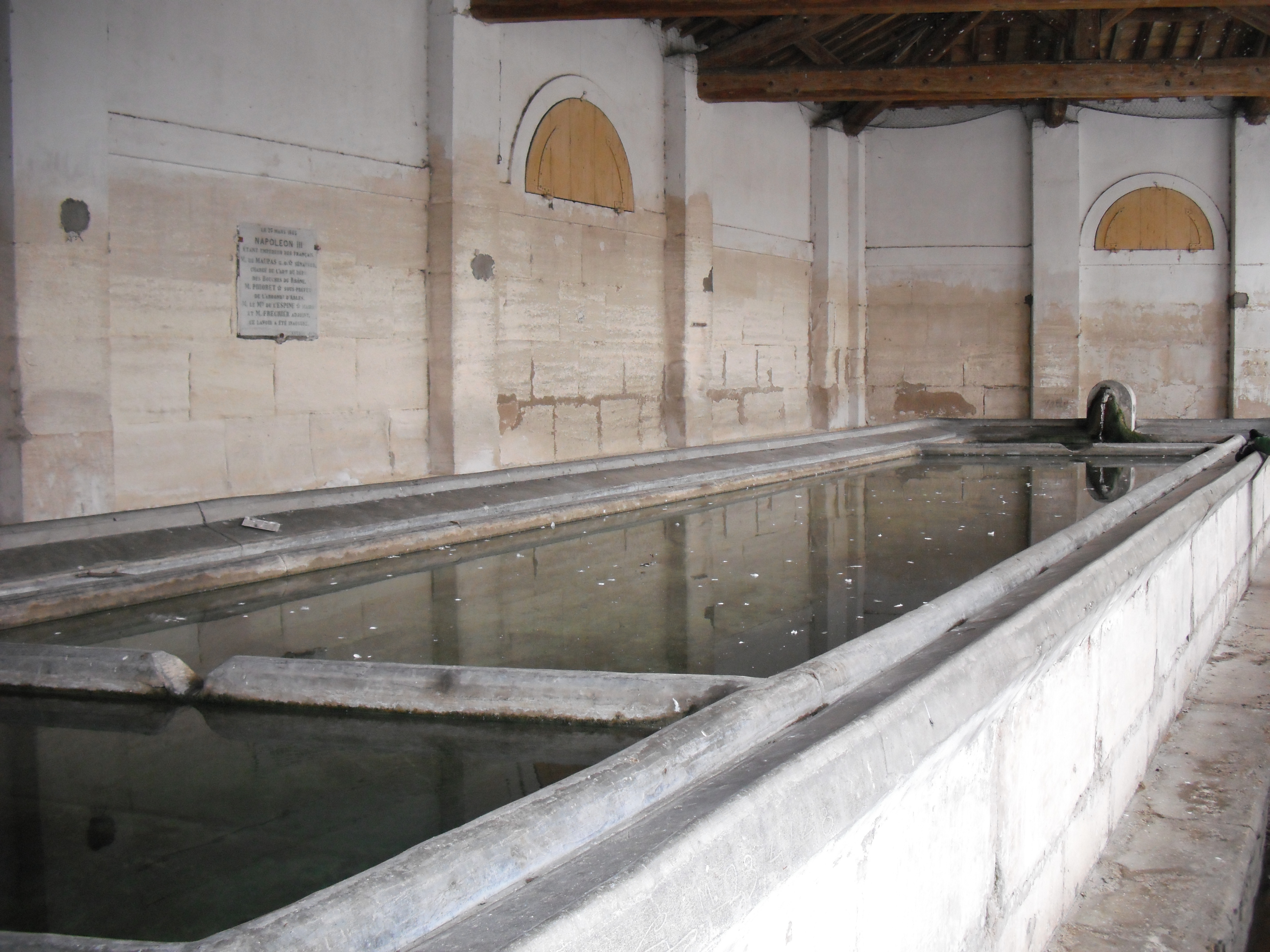 43°43′16.7″N 4°48′14.9″E / 43.721306°N 4.804139°E